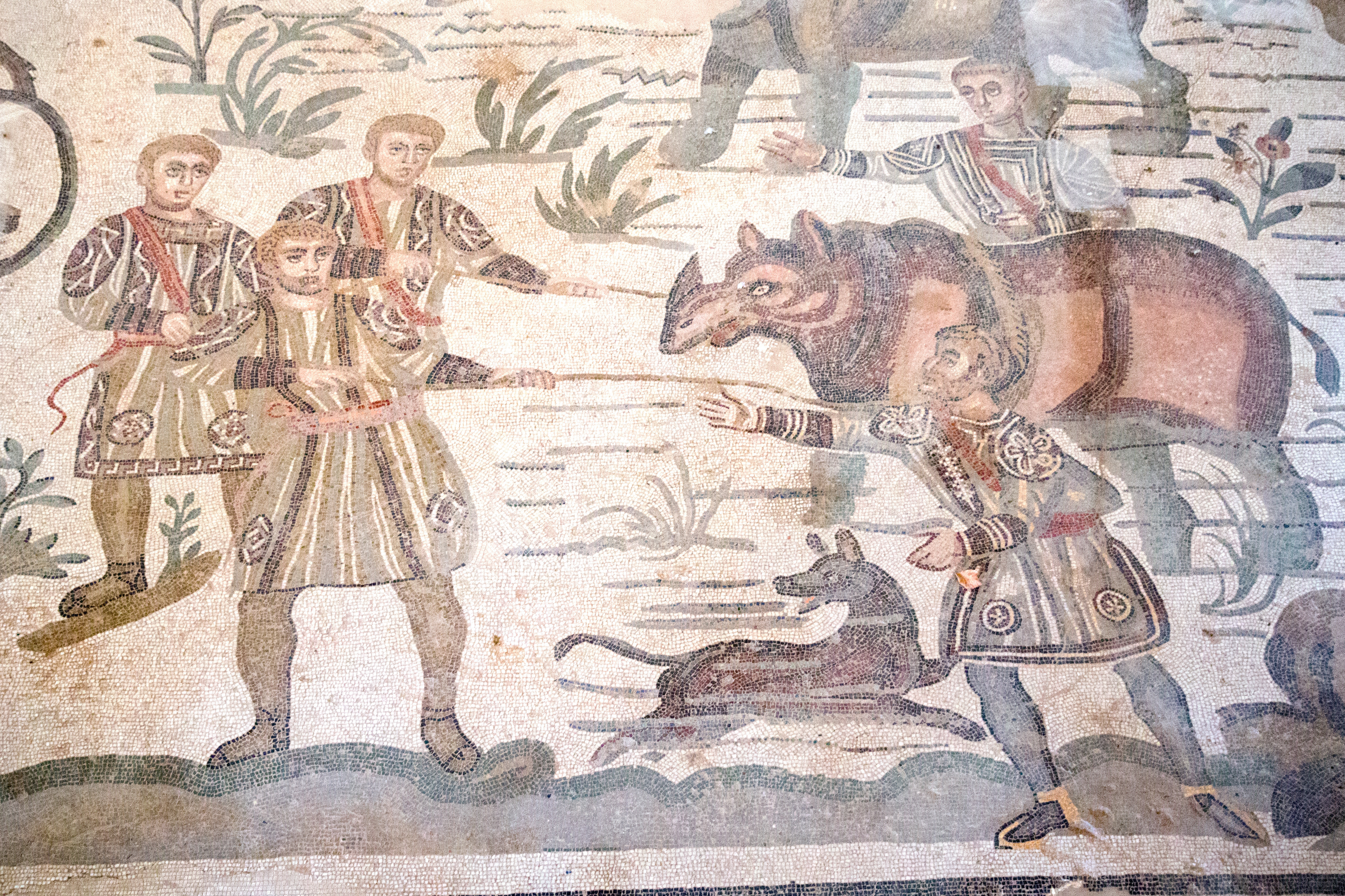 Villa Romana del Casale